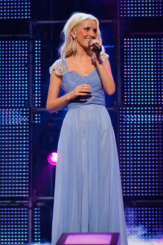 Maria Arredondo